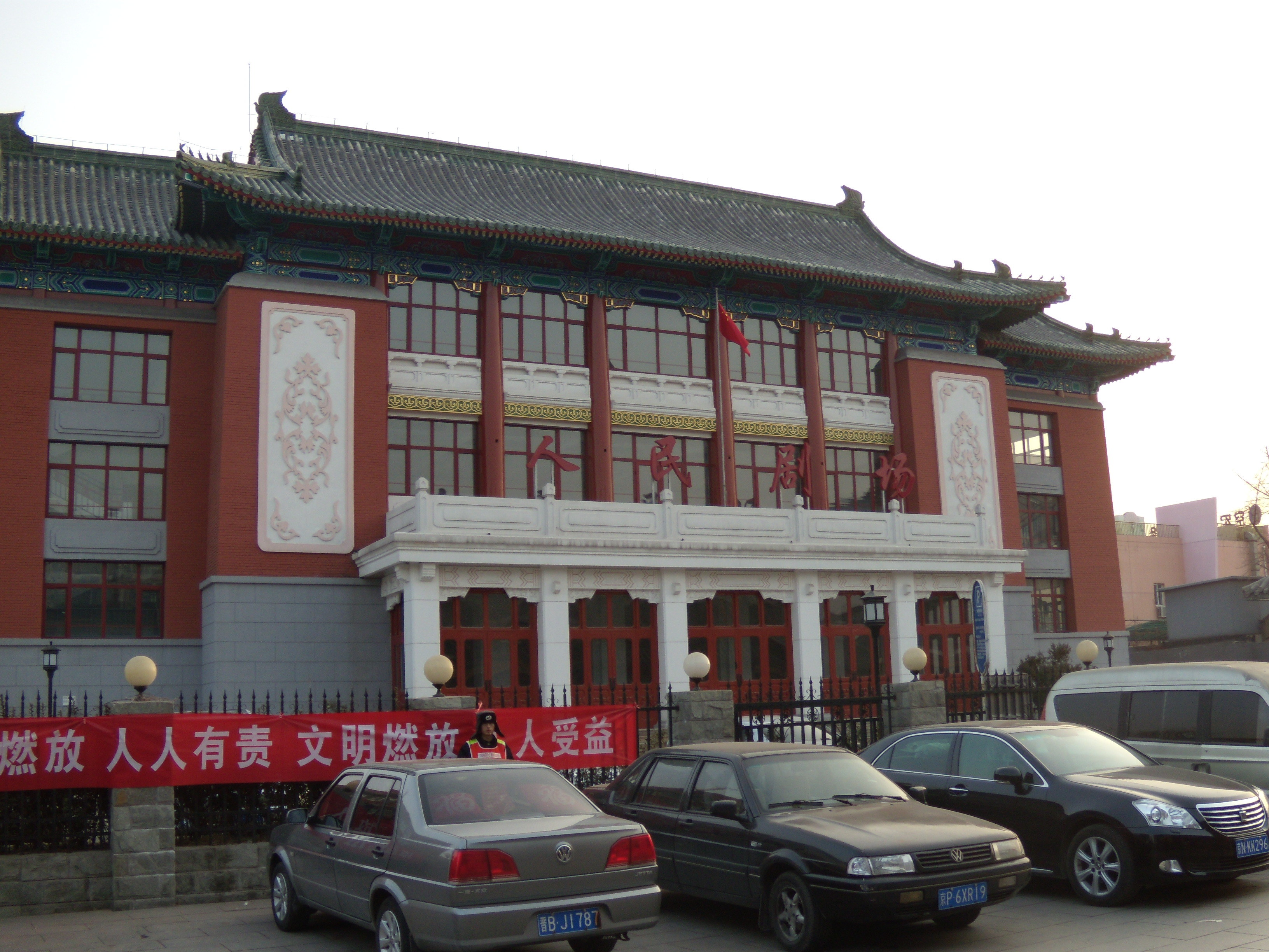 人民剧场，位于北京市西城区护国寺街74号